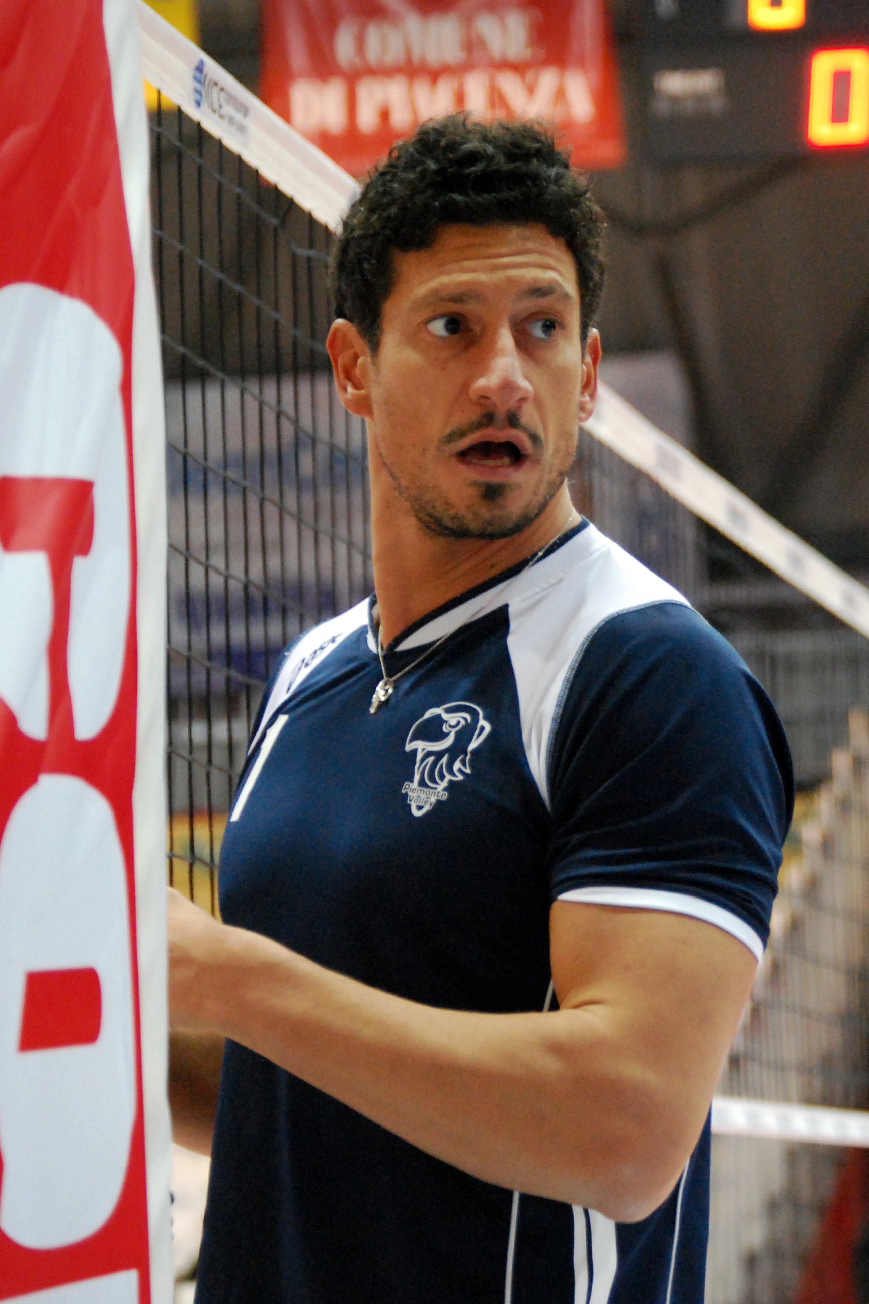 Scattata durante l'incontro Piacenza-Cuneo